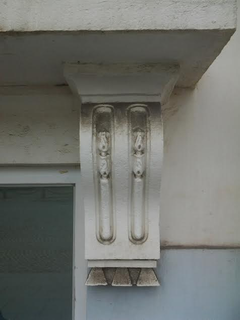 Corbeau à motif de gouttes et rudentures vu de face